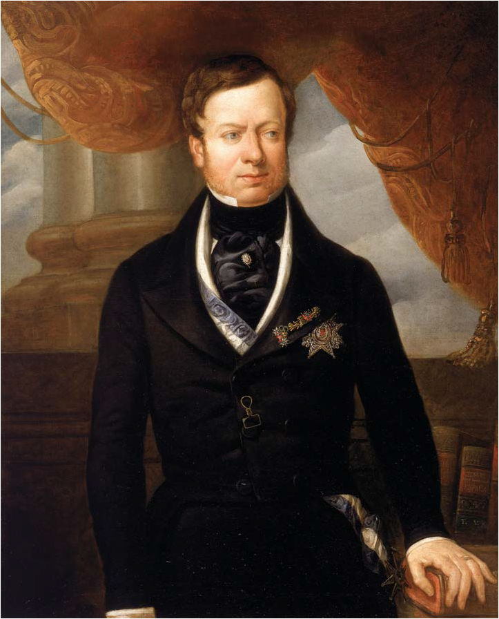 Retrato del aristócrata y politico español José María Queipo de Llano (1786-1843), que fue el séptimo conde de Toreno, Grande de España y Presidente del Consejo de Ministros de España.